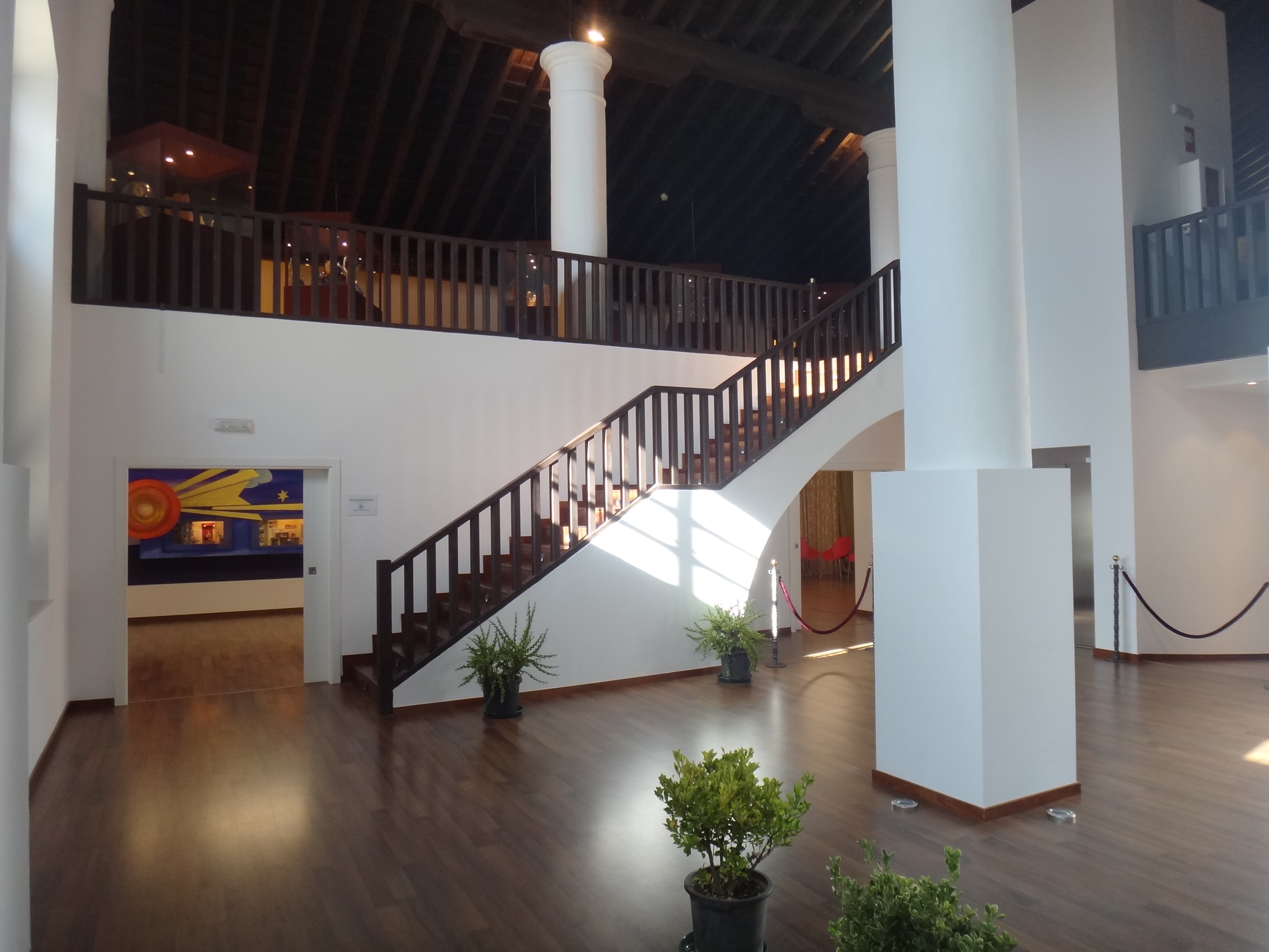 Hall del Museo del Belén de Jerez (Andalucía, España)